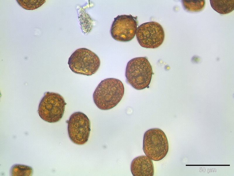 Straffblättriges Apfelmoos (Bartramia ithyphylla), sporen, 400x